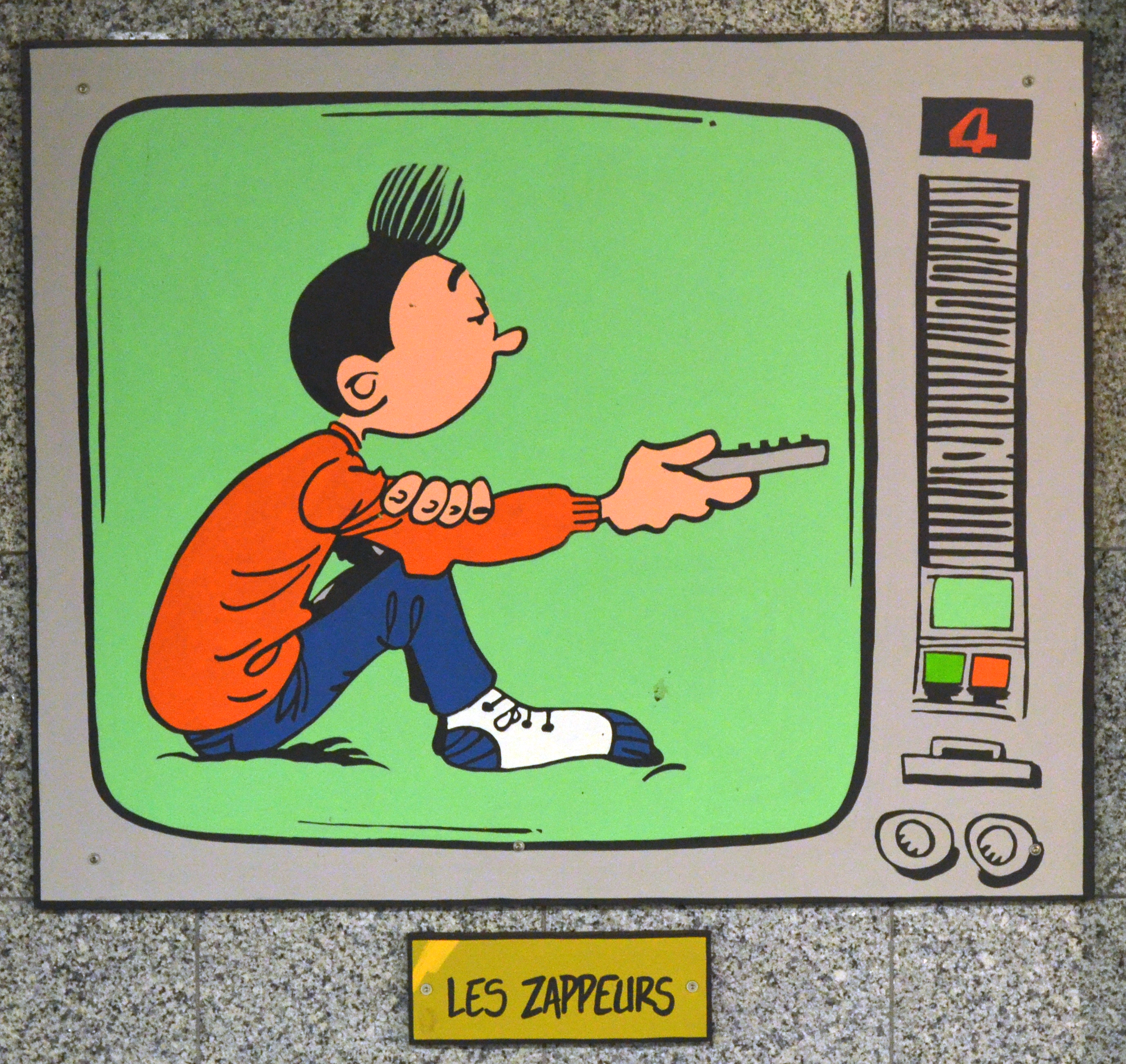 Charleroi (Belgique) - Station Janson du métro léger. Les Zappeurs.